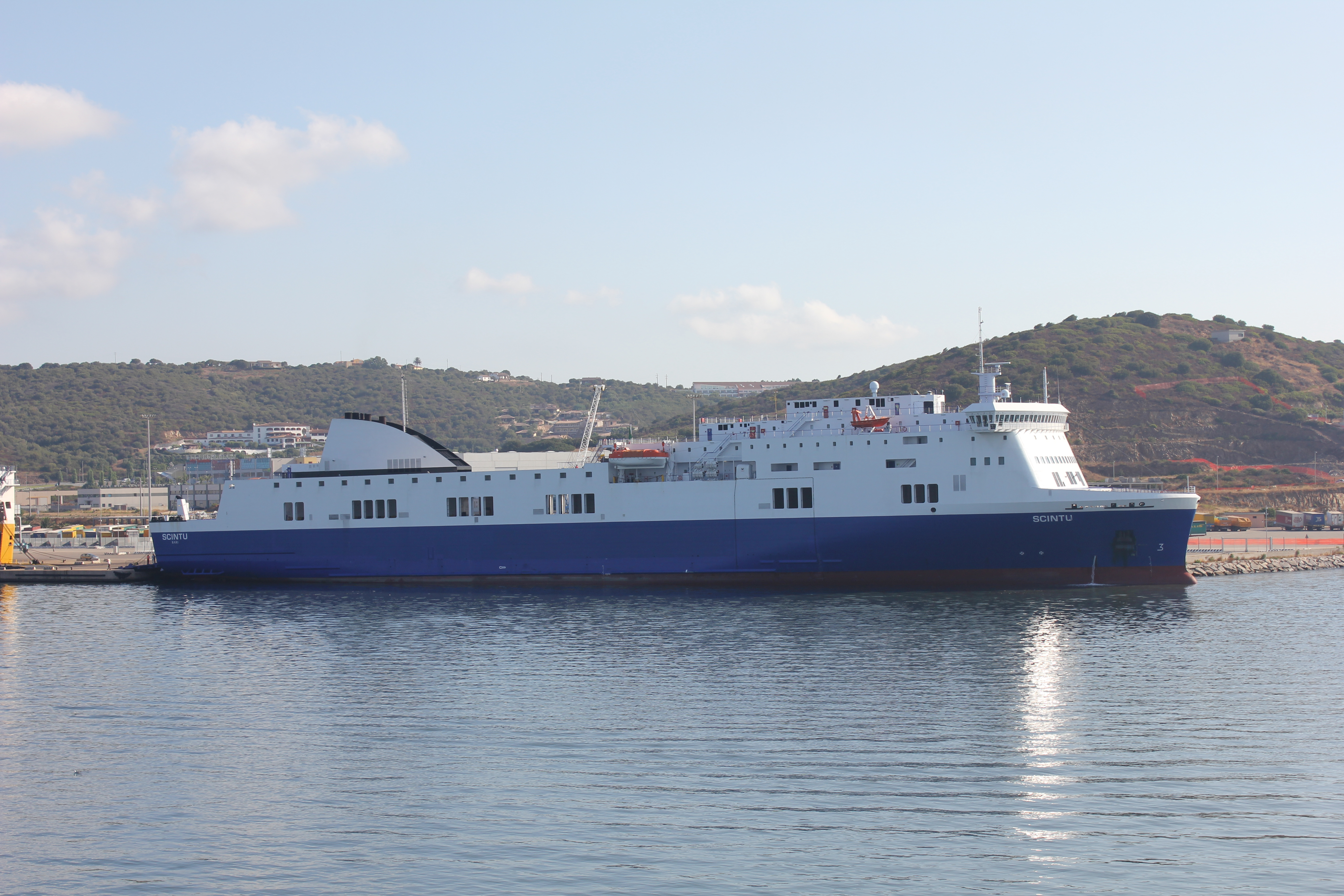 La Scintu ormeggiata a Olbia